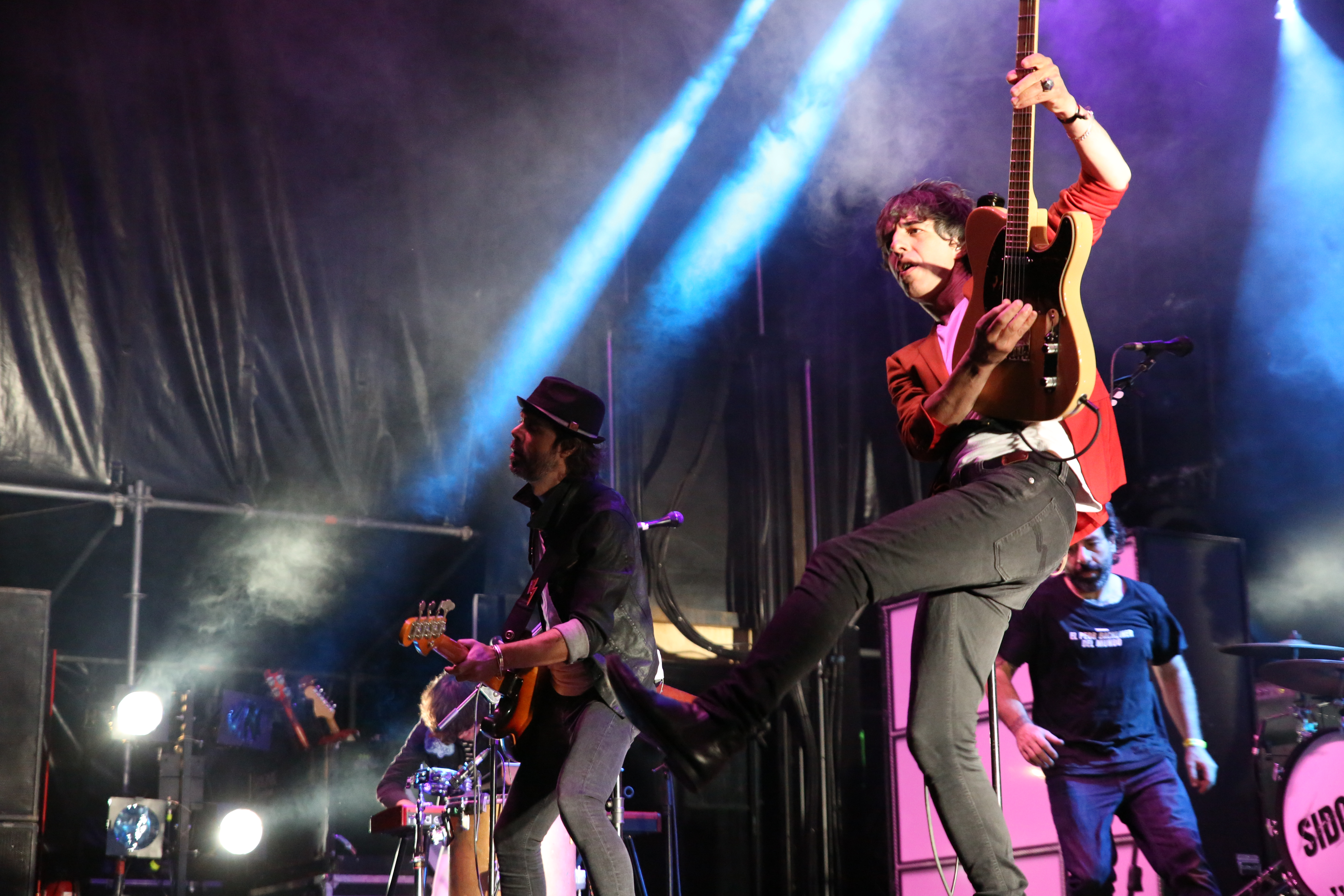 El grupo Sidonie en el festival Palencia Sonora 2017.